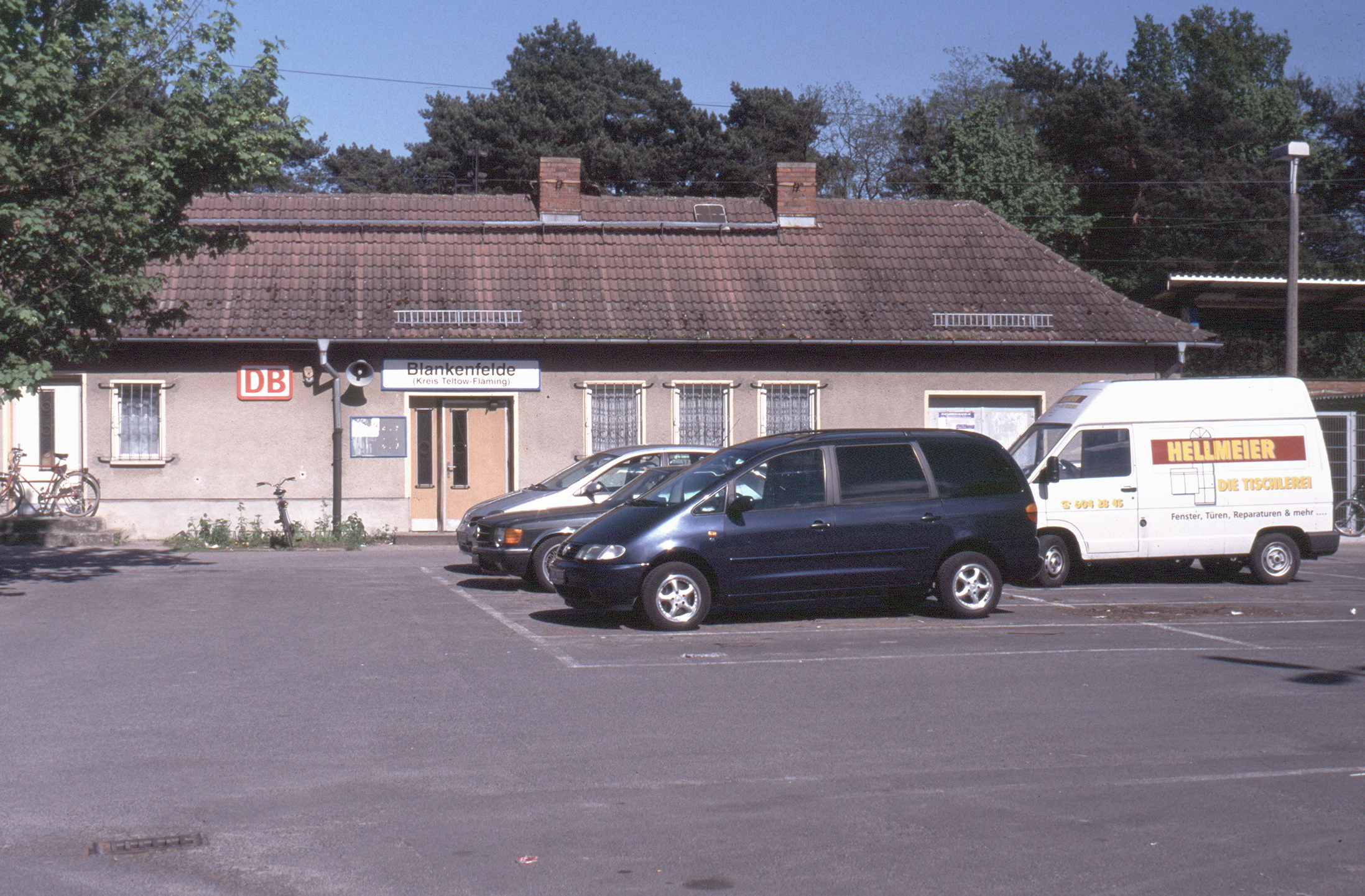 Stationsgebäude Blankenfelde